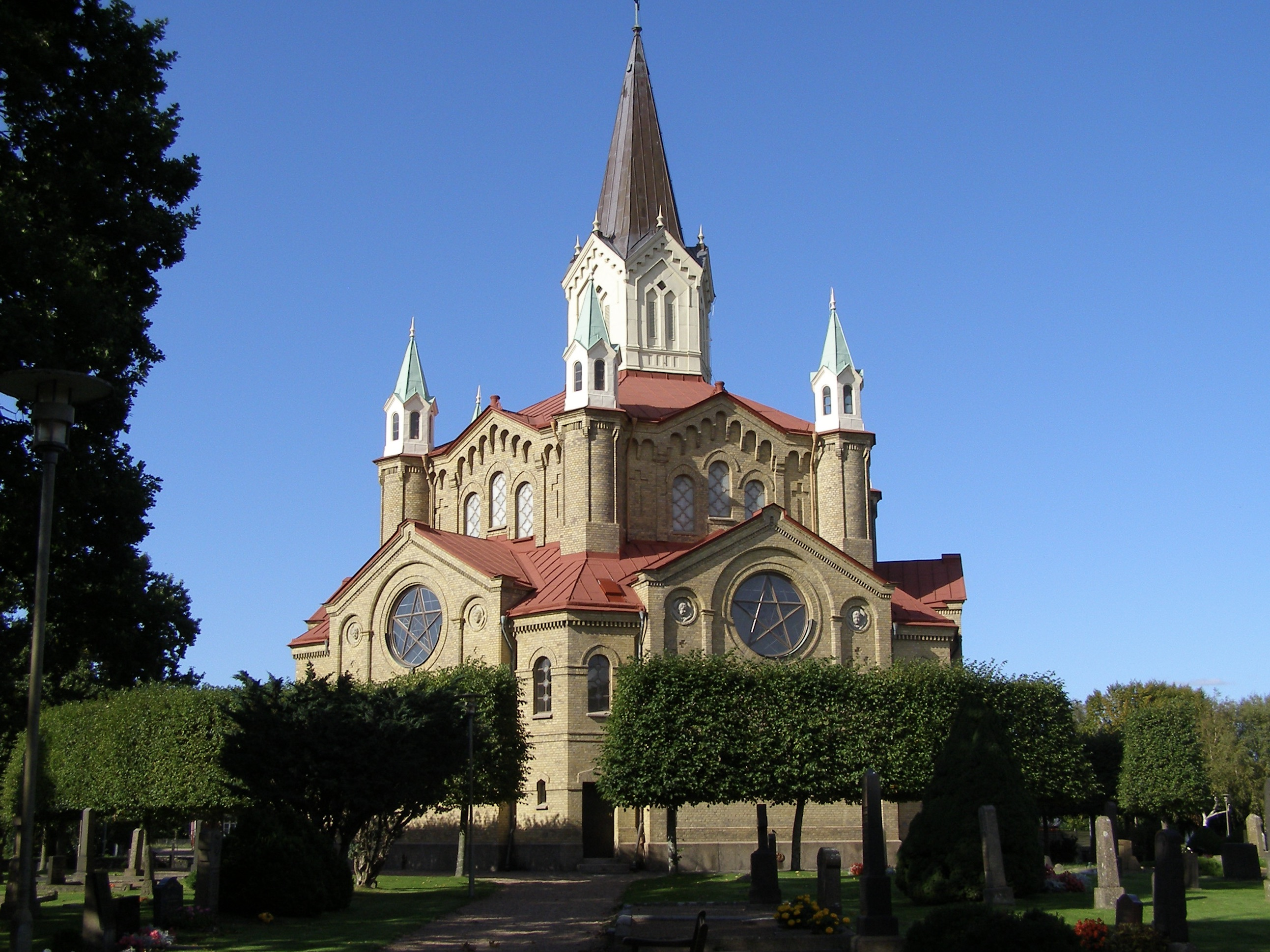 Snöstorp-i templom, Snöstorp, Halmstad község